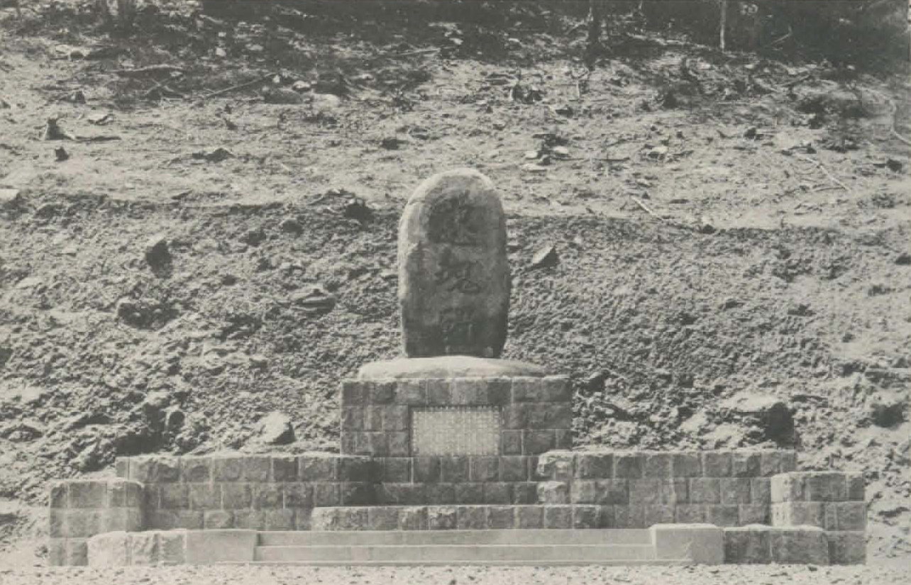 中文（台灣）: 於1936年立於牡丹社事件發生地，石門古戰場的忠魂碑，